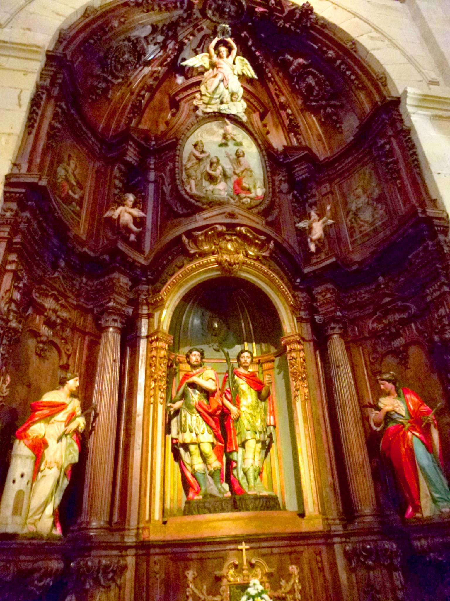 Iglesia de San Nicolás (Bilbao)